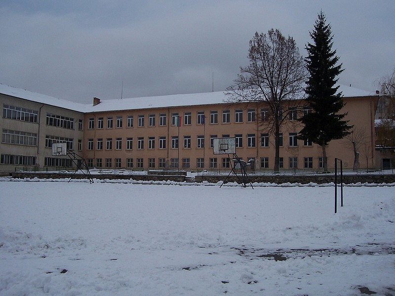 Училището в Кочан